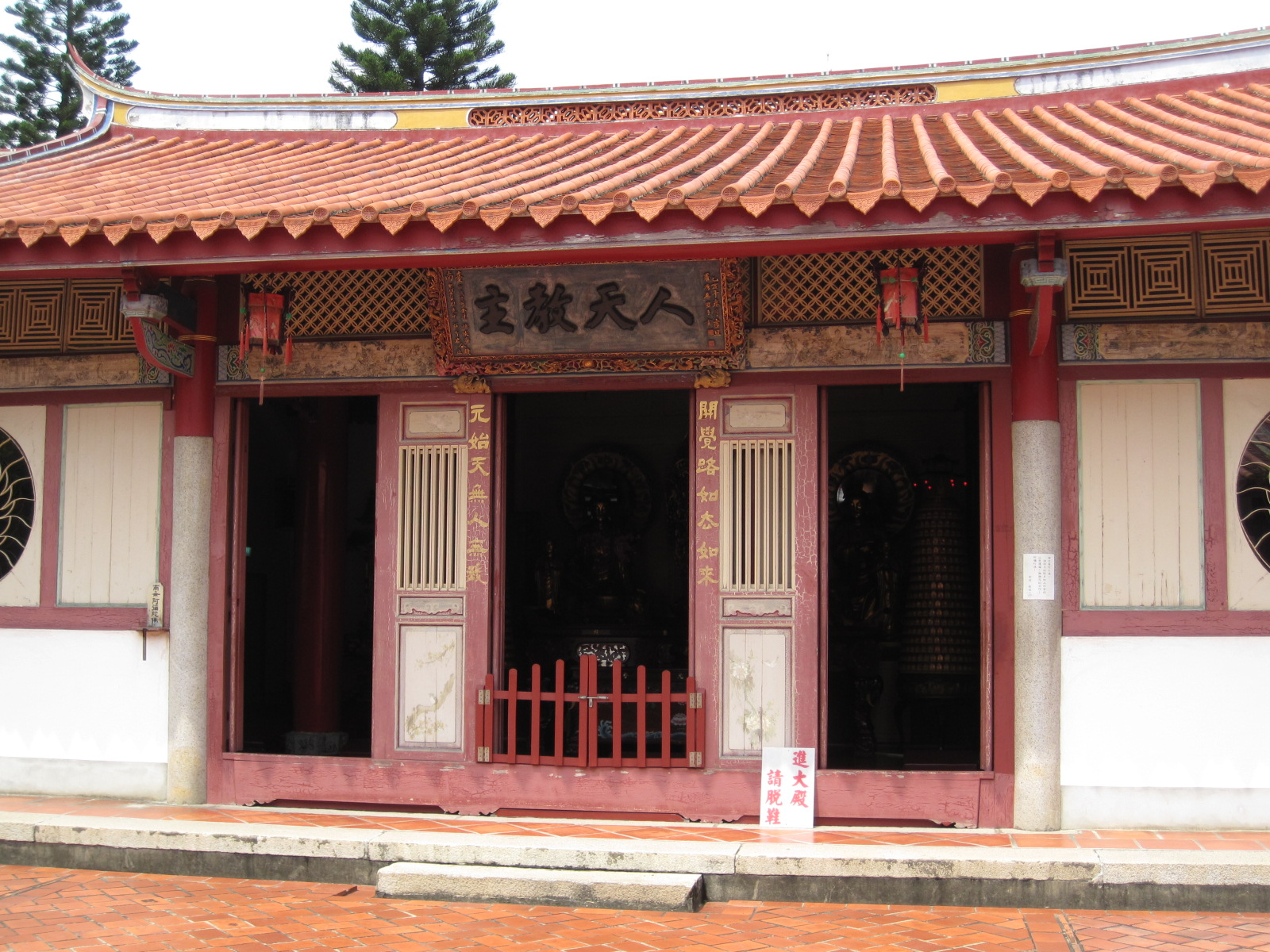 臺南開元寺大雄寶殿